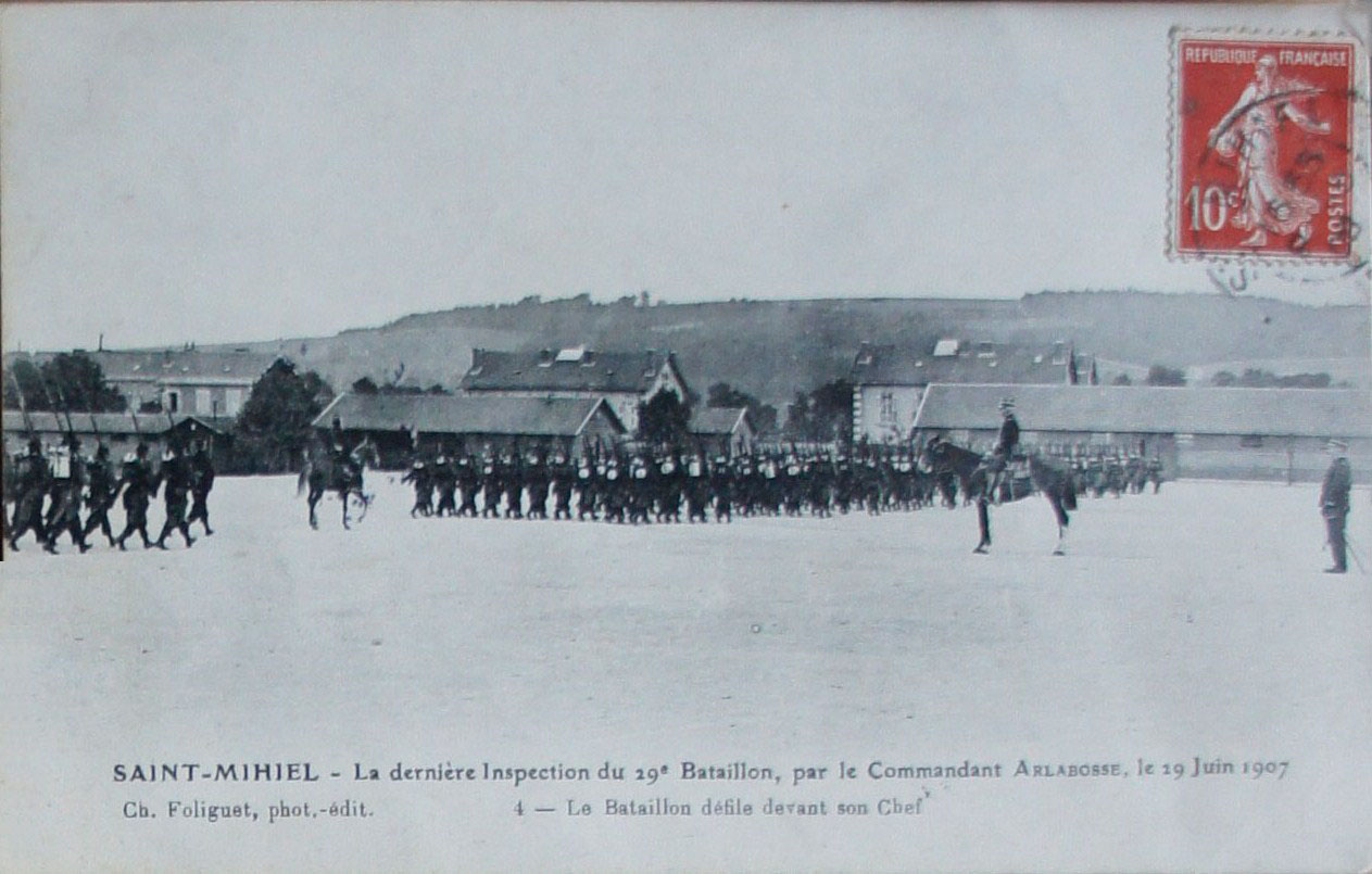 carte postale ancienne de st-Mihiel.